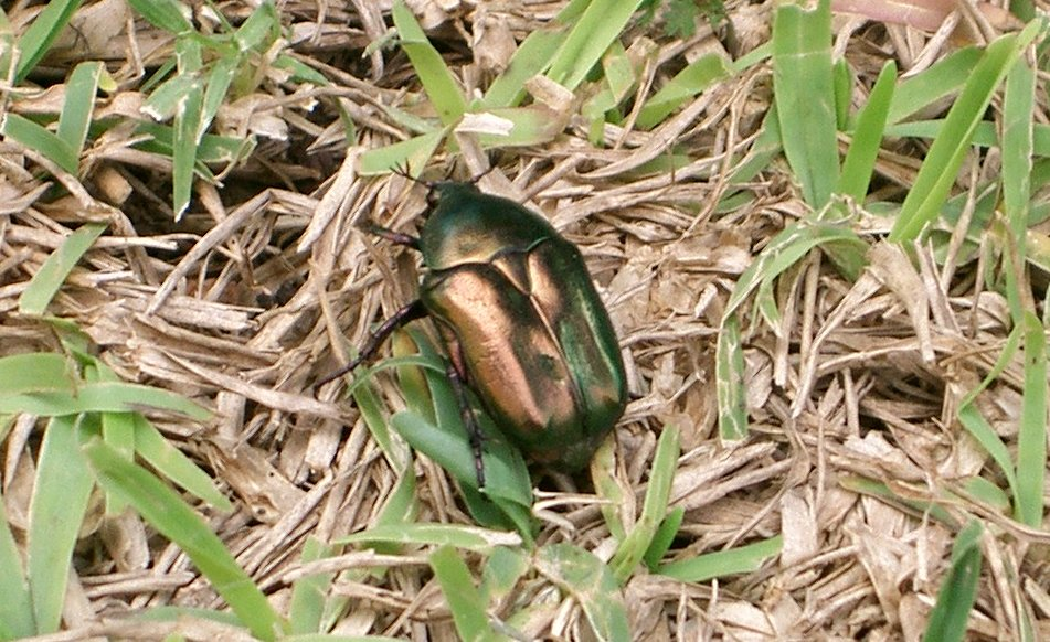 Escarabat daurat. Photograph from Son Carrió, Mallorca. Protaetia cuprea brancoi (Baraud, 1992) (Font)